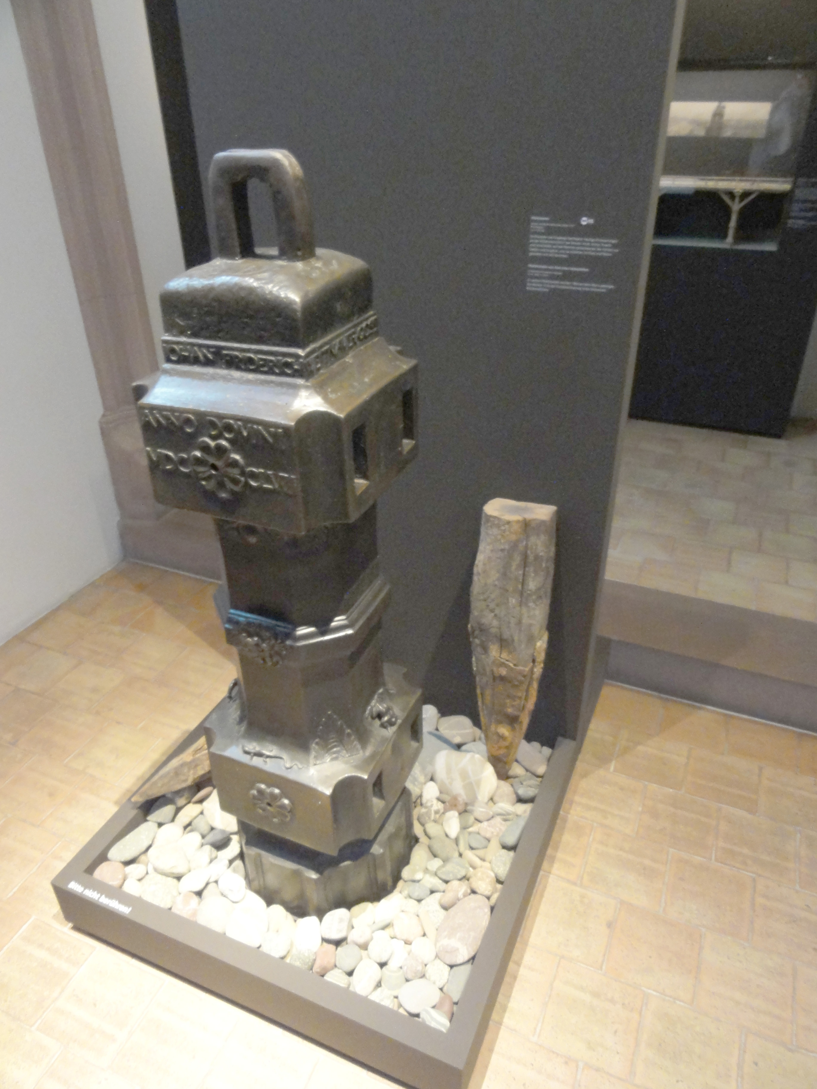 Basel — Historisches Museum